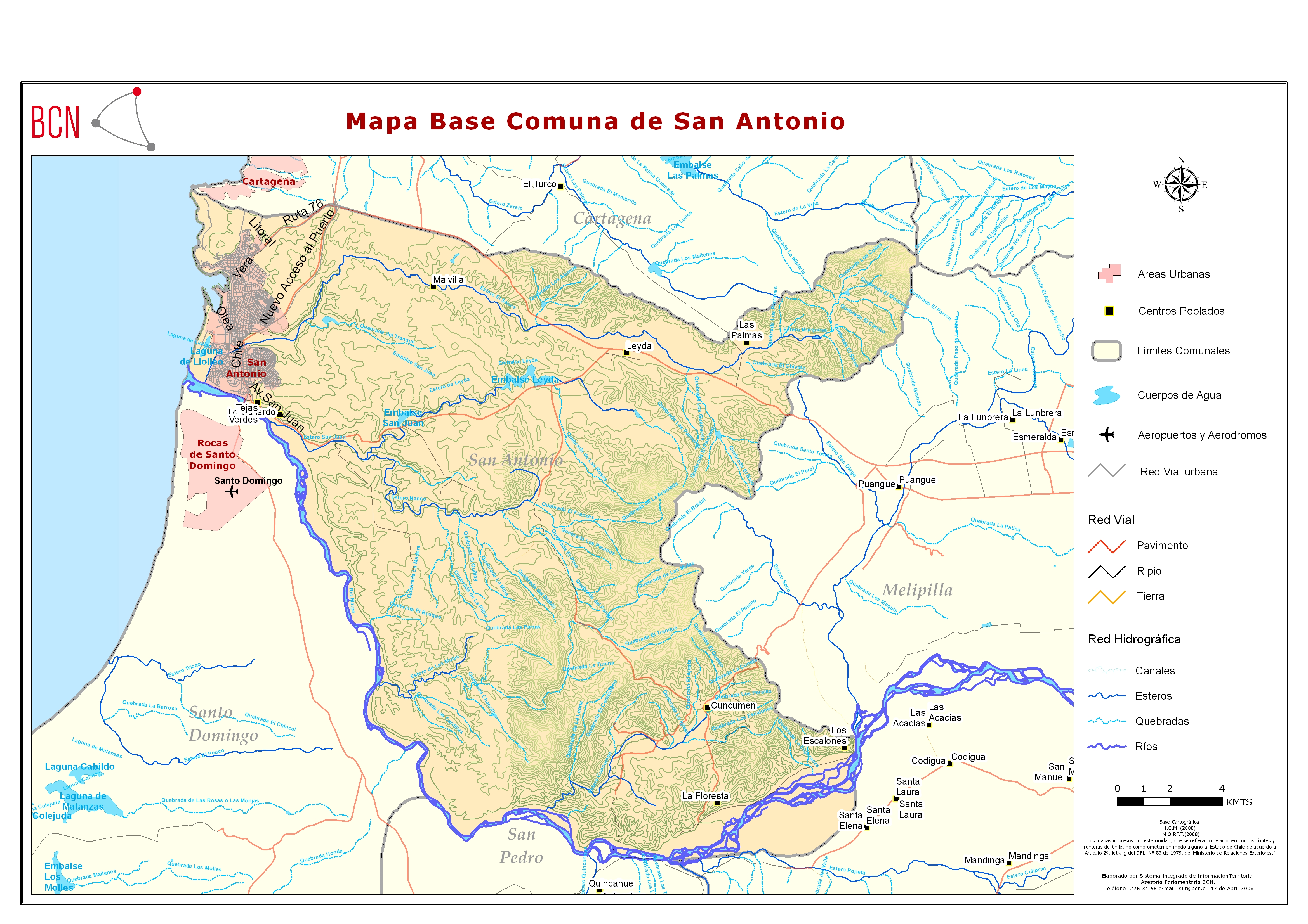 Mapa Base Comuna de San Antonio de la Biblioteca Nacional